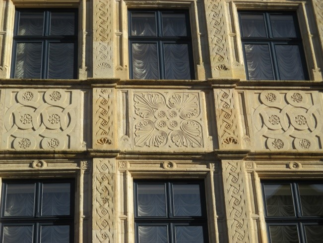 Steinmetzarbeiten am alten Rathaus in Luxemburg Stadt am Krautmarkt (Palais Grand-ducal)